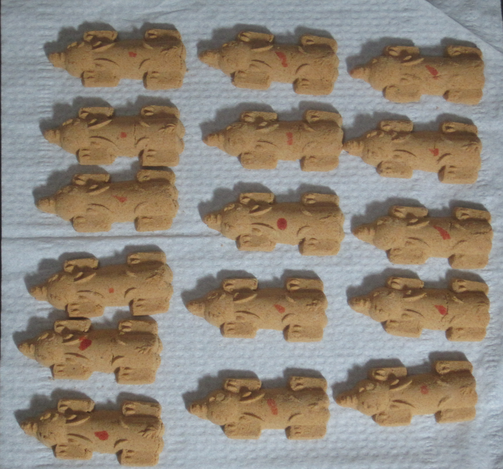 臺南水仙宮市場新永珍餅舖的「十六羊」。